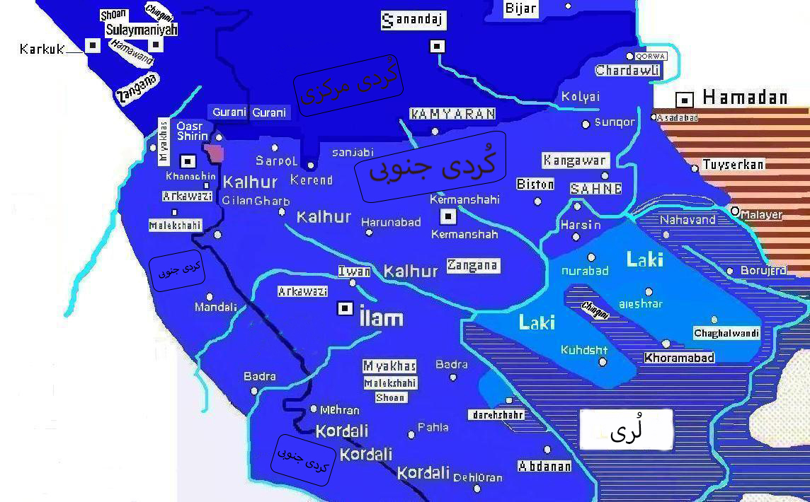 اطلاعات درست